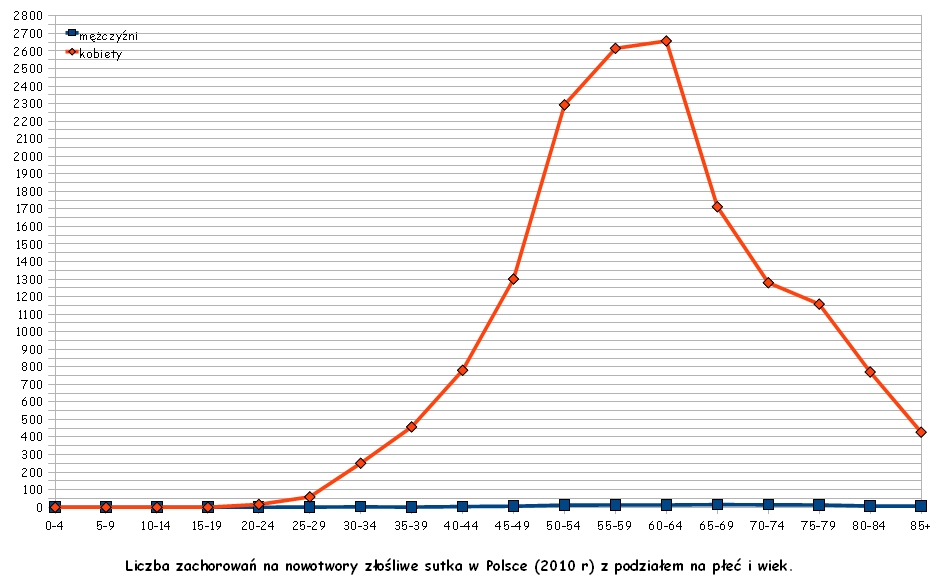 Nowotwór sutka - wykres zachorowalności